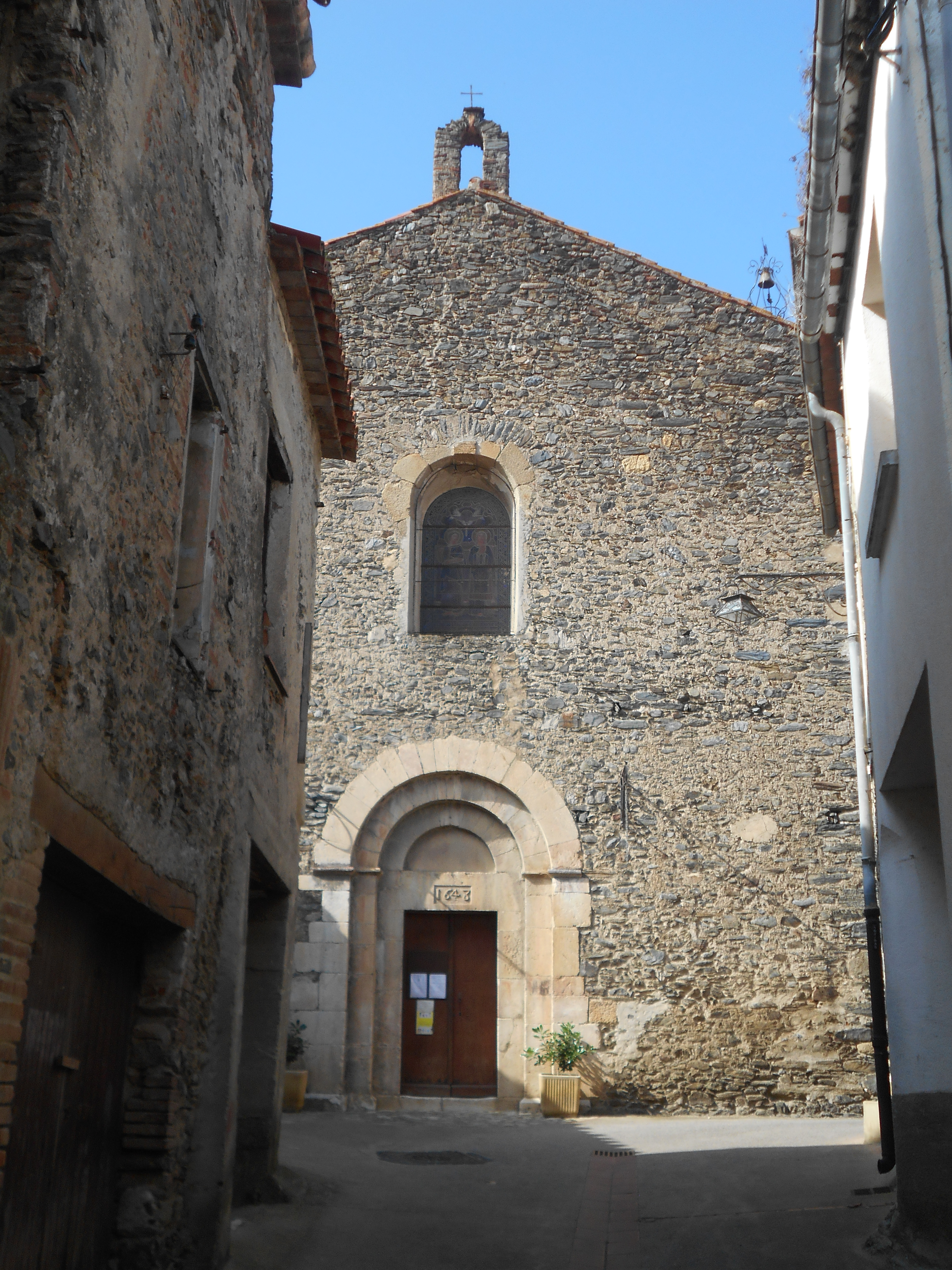 Santa Eulàlia de Rigardà. Façana oriental